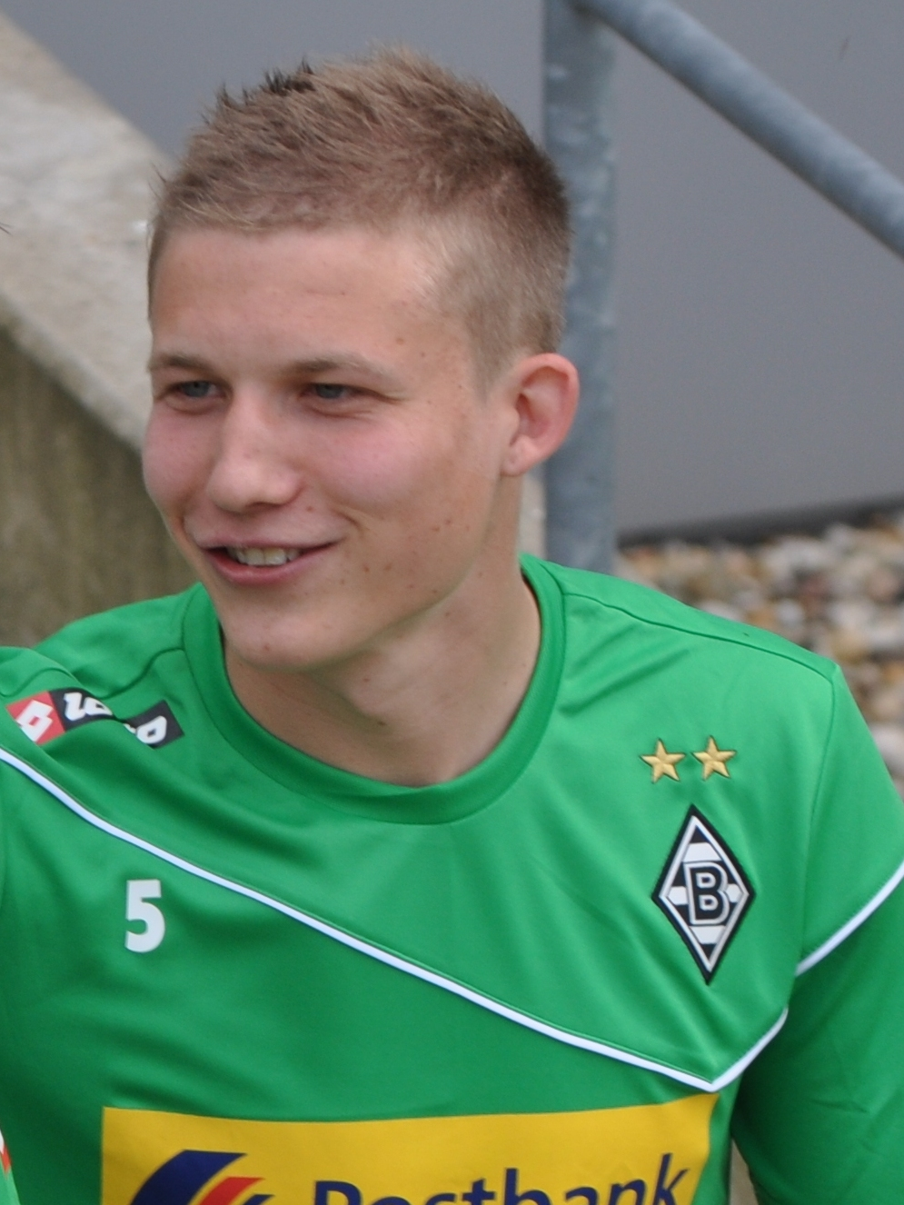 Alexander Ring beim Training